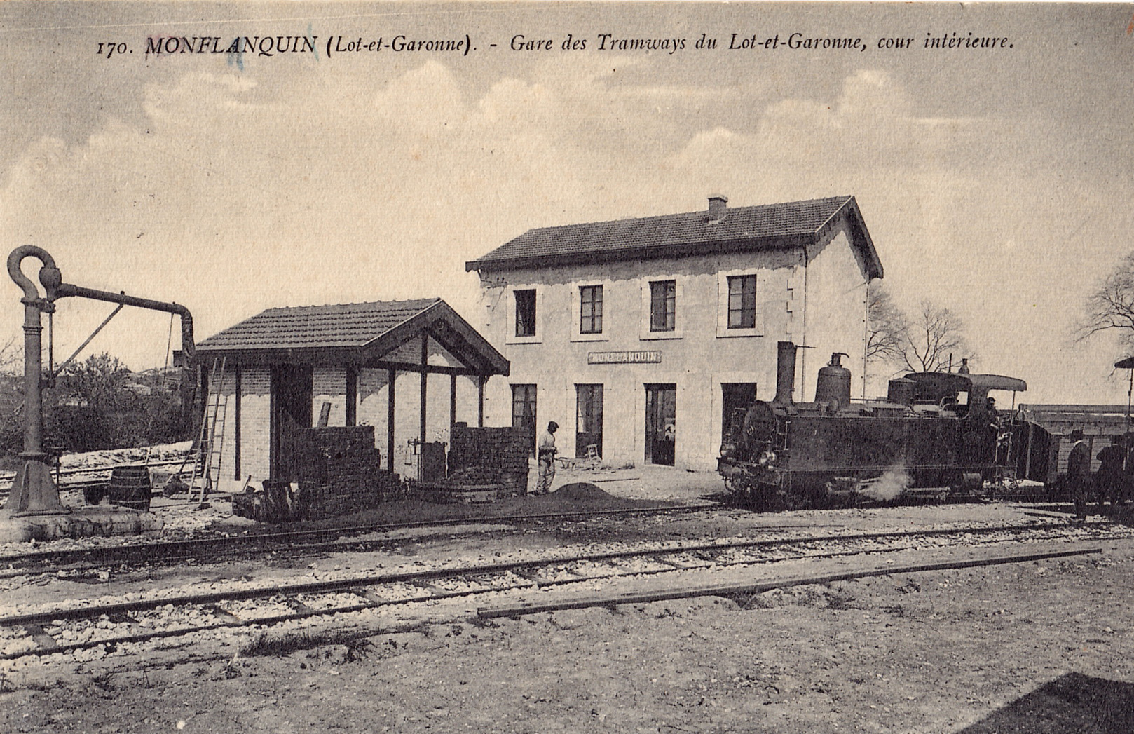 Carte postale ancienne sans mention d'éditeur, n°170 : MONFLANQUIN - Gare des Tramways du Lot-et-Garonne, cour intérieure